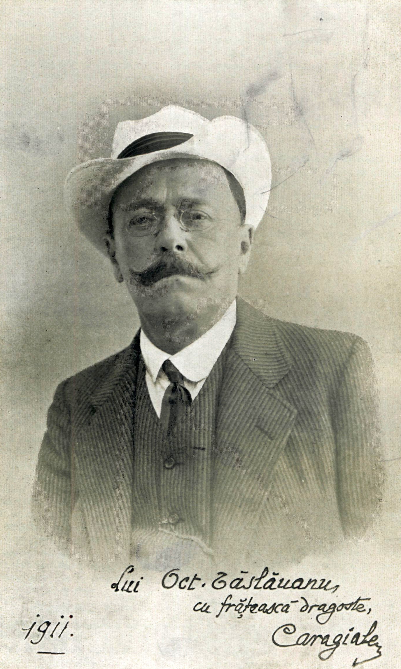 Portretul lui I.L. Caragiale, cu o dedicație către Octavian C. Tăslăuanu. Textul dedicației este următorul: „Lui Oct. Tăslăuanu, cu frățească dragoste, Caragiale. 1911.”